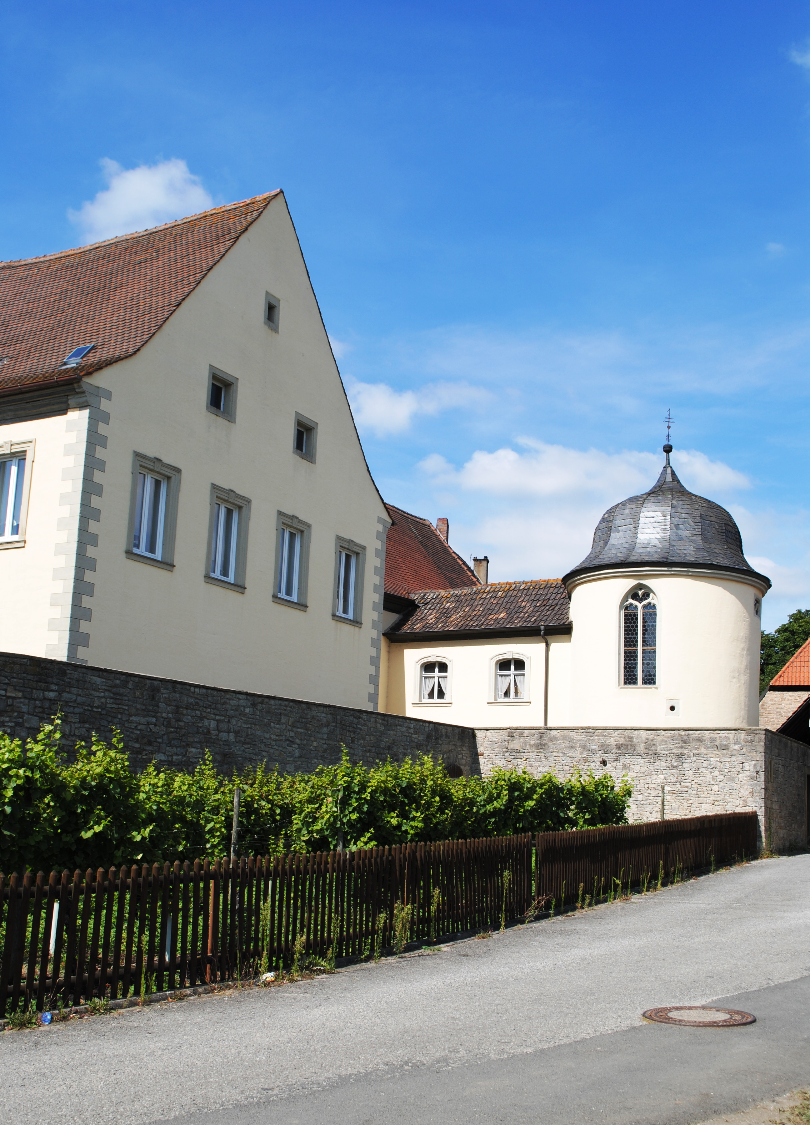 Zehnthof Sommerach, Rückseite, Kapelle, VerbindungsbauThis is a photograph of an architectural monument.